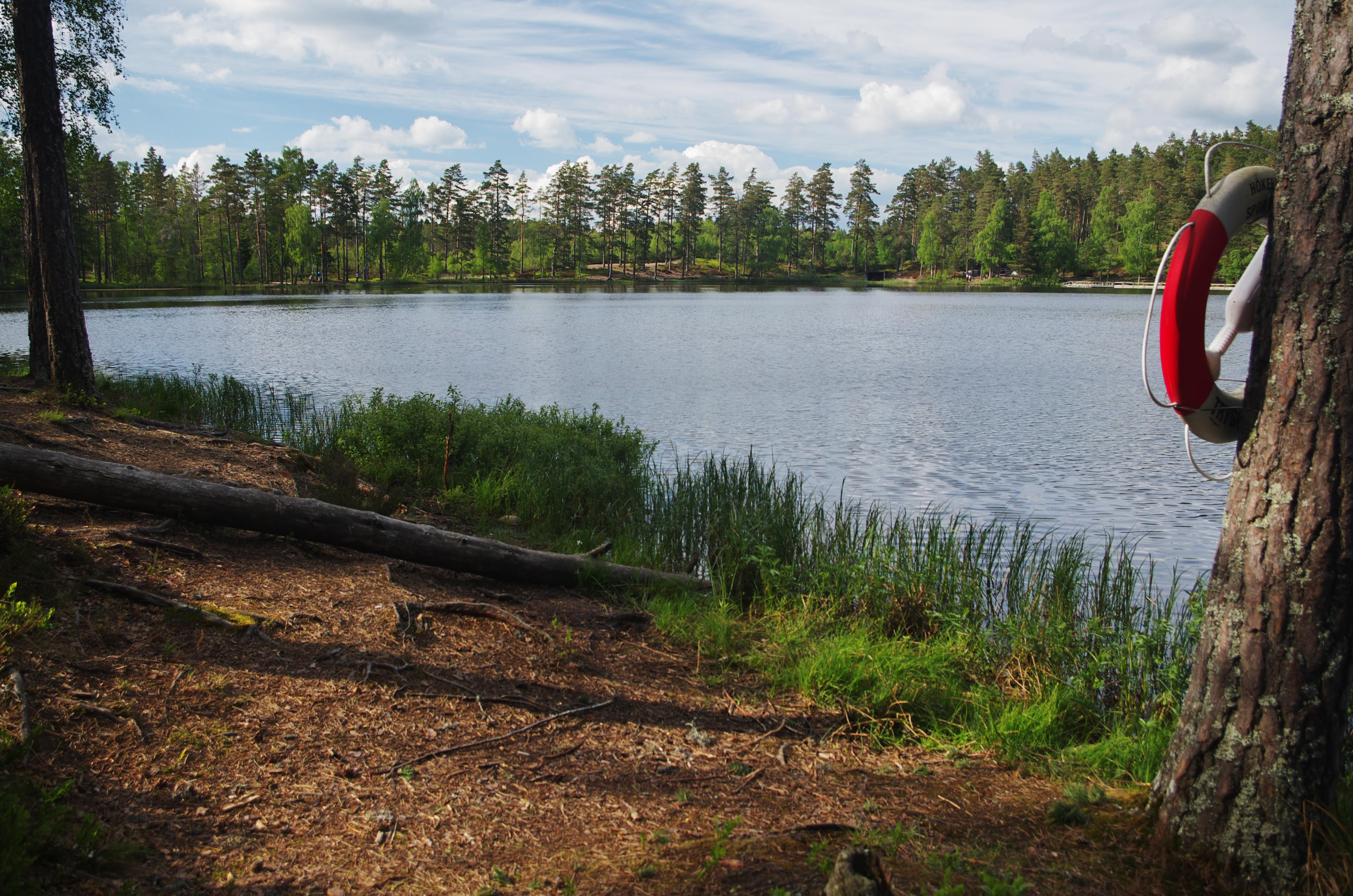 Björnsjön är en fiskesjö på Hökensås i Tidaholms kommun i Västergötland, Sverige.